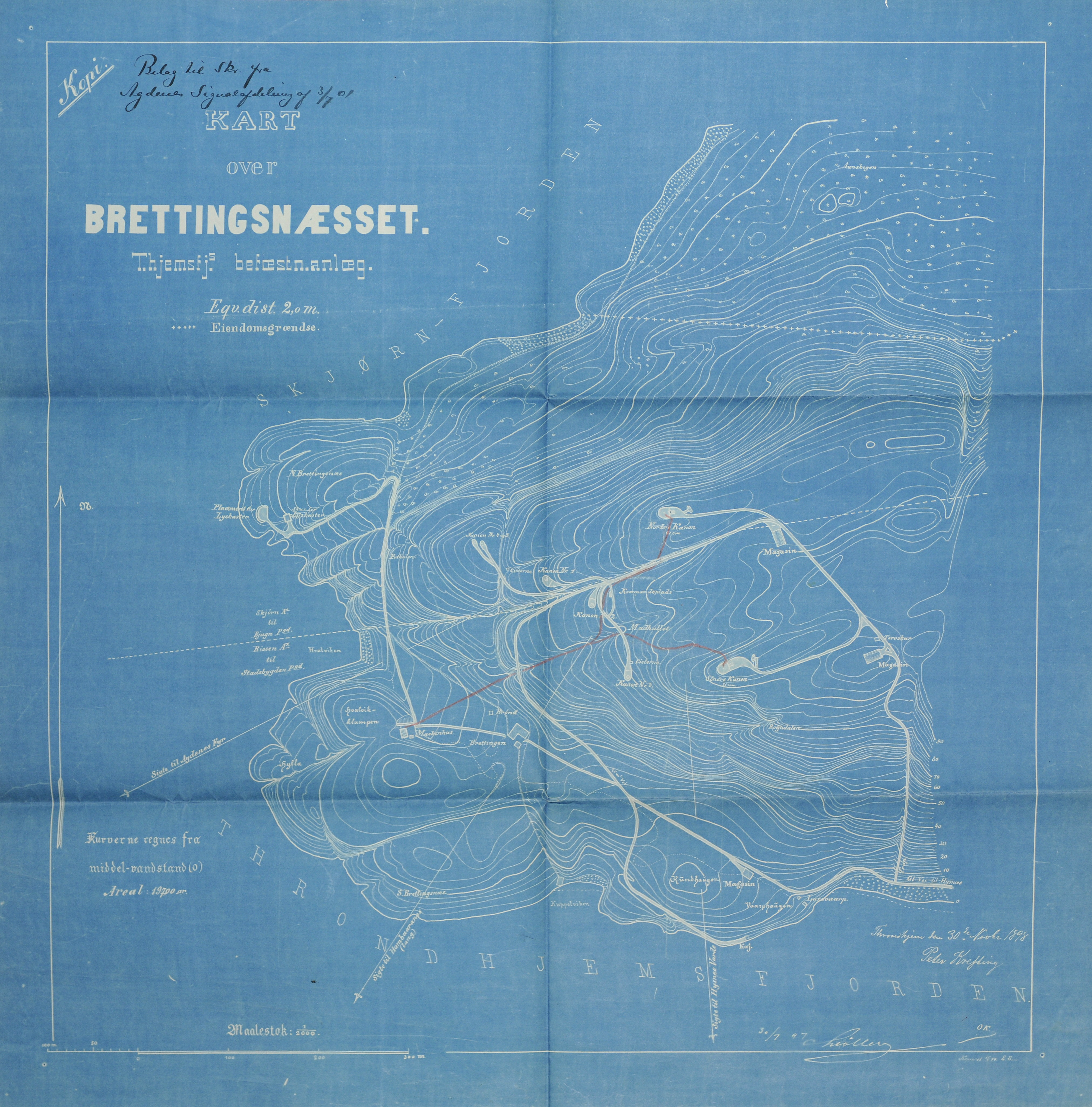 Kart over Brettingen fort